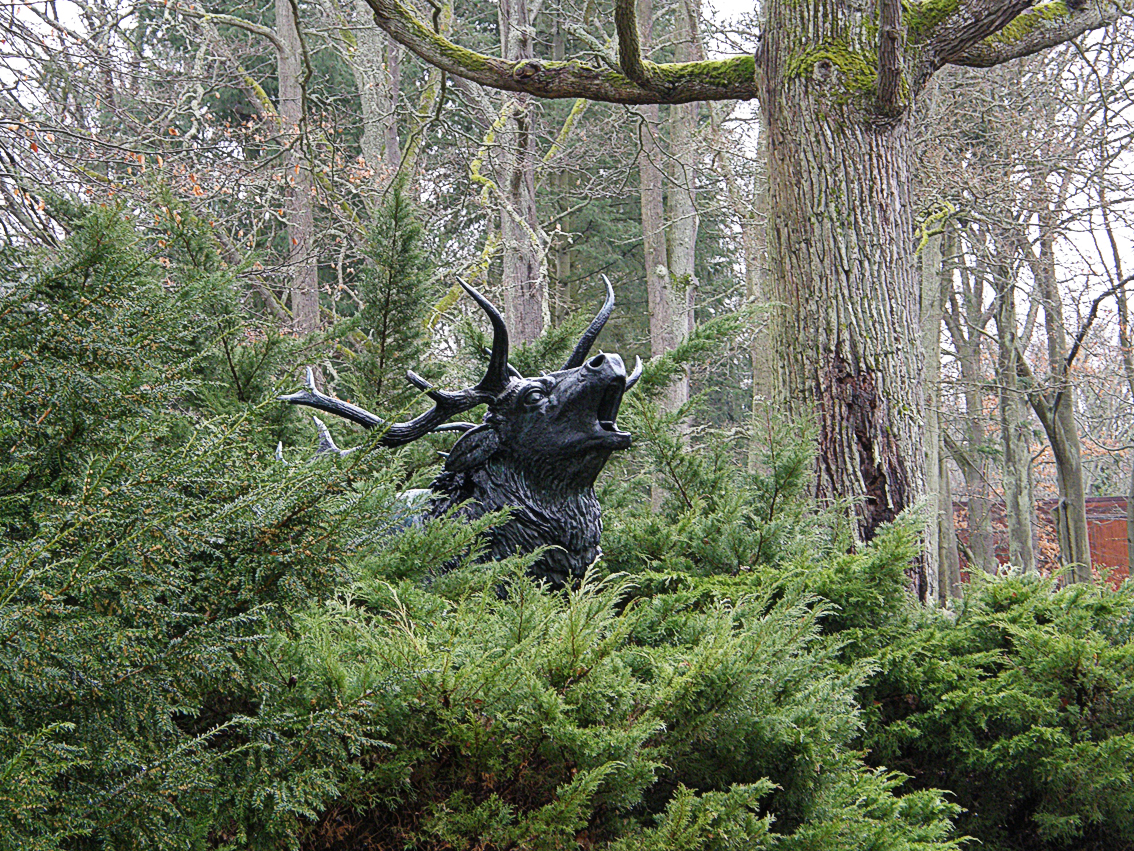 Am Eingang bricht ein Hirsch aus dem Unterholz. Das Jagdschloss Hubertusstock nahe Joachimsthal in dem Erich Honecker wohnte/jagte.